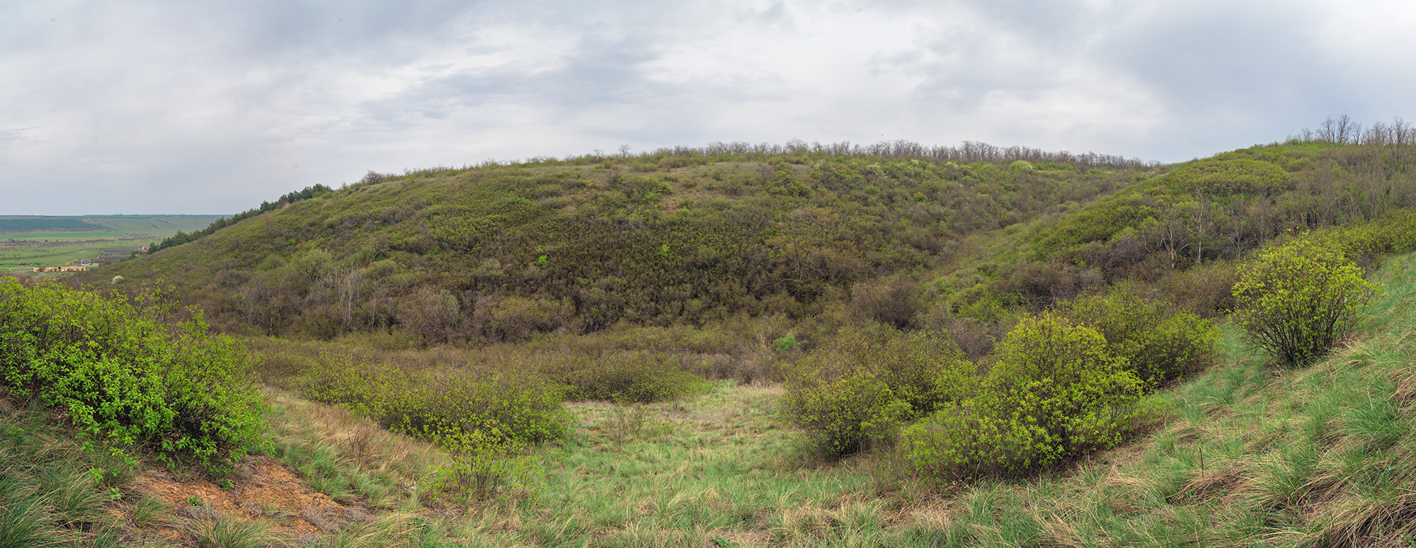 «Михайлопільський», Іванівський р-н., біля села Михайлопіль